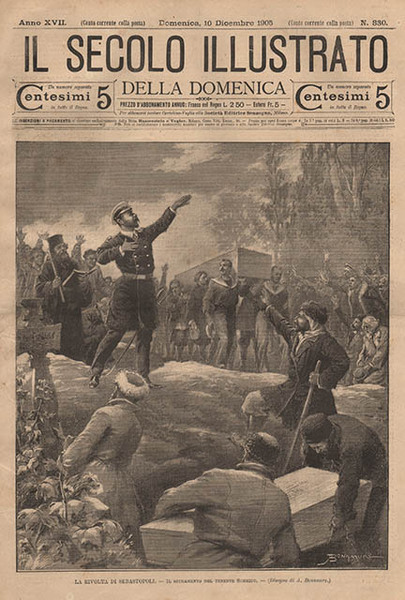 La rivolta di Sebastopoli. - Il giuramento del tenente Schmidt - disegno di A. Bonamore - Il Secolo Illustrato della Domenica - Anno XVII, 10 dicembre 1905, n. 830 dimensioni: 405x300 mm - frontespizio di fascicolo in B/N in folio di 8 pp.